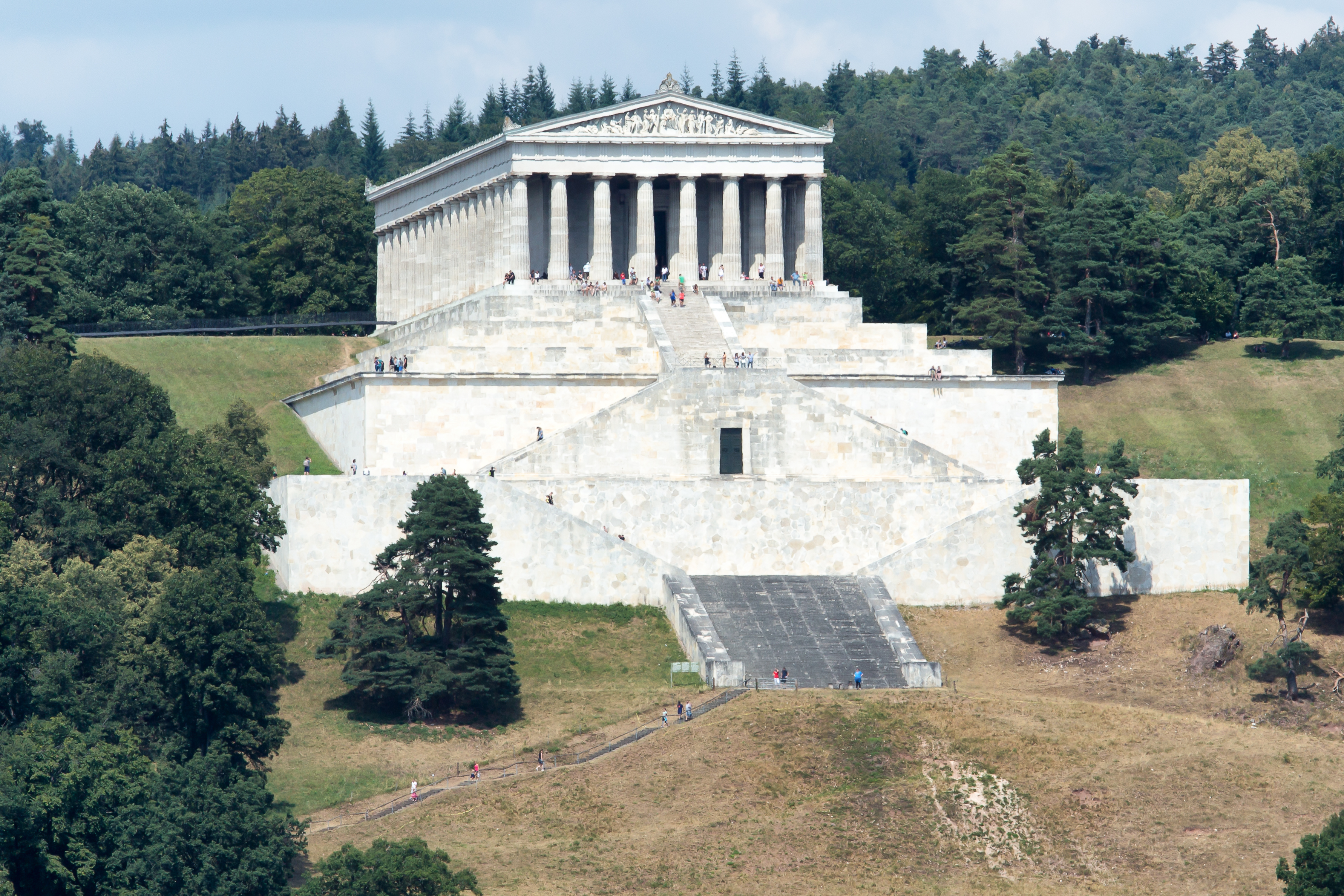 Entfernter Blick auf die Gedenkstätte Walhalla